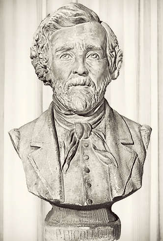 Buste sur piédouche de Paul Jean Rigollot au cimetière de l'église paroissiale Saint-Loup à Asnois (58). Calcaire : taillé ; terre cuite (rose). Epitaphe sur le piédestal : J.PAUL RIGOLLOT/DECEDE LE 11 MARS/1873/DANS SA 62 EME ANNEE; Au revers du piédestal : SAVANT DESINTERESSE/N'AYANT QU'UN BUT/SOULAGER L'HUMANITE/LE CONTRAIRE IL FUT/DE CENT AUTRES CELEBRITES, F.R. ; Sur le piédouche du buste, devant : P.RIGOLLOT ; à gauche signature : MASABON.